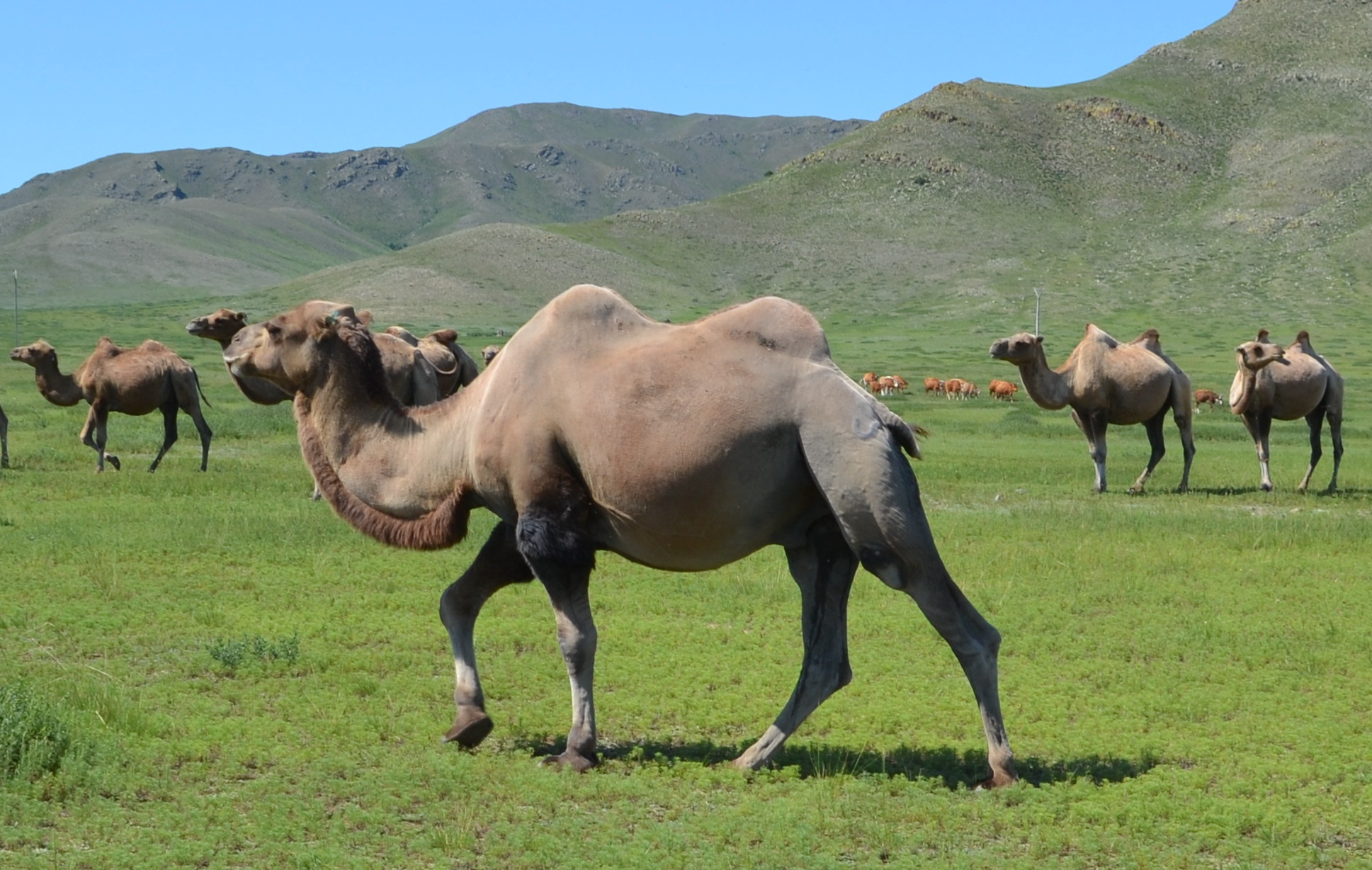 Двугорбые верблюды - бактрианы. В окрестностях Дархана. Центральная Монголия.